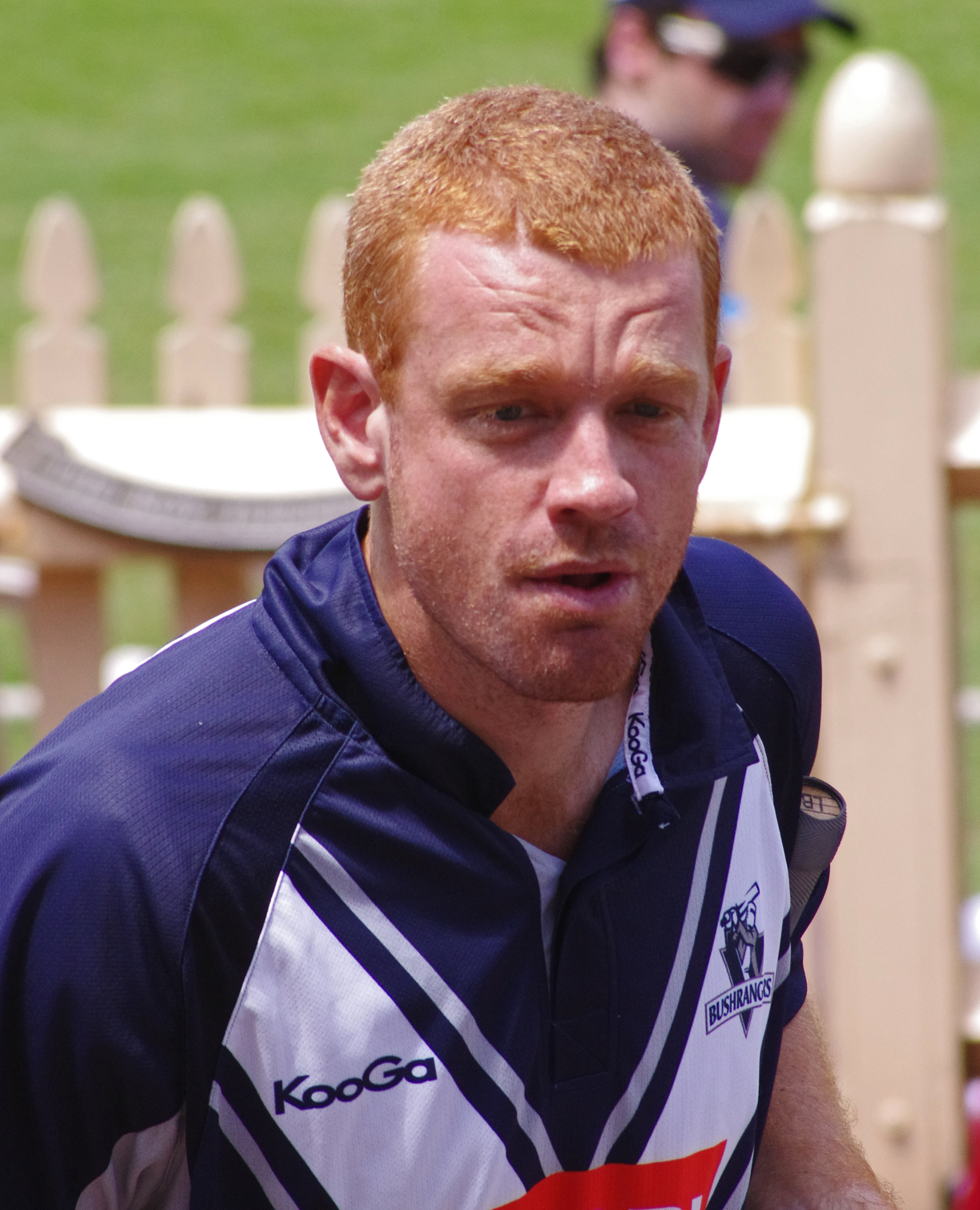 Andrew mcdonald